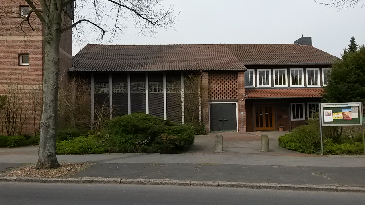 Zu sehen ist der Gemeindesaal von der gegenüberliegenden Straßenseite